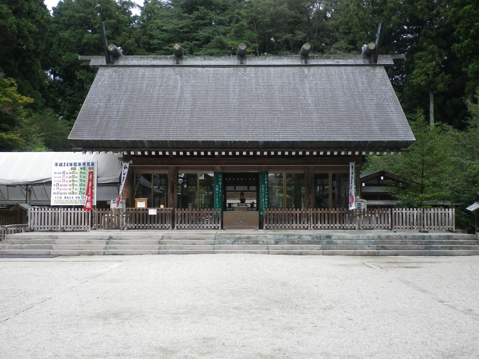 乃木神社 (那須塩原市)